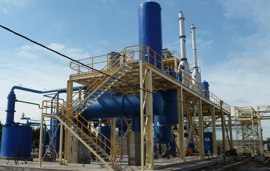 Planta de pretratamiento del aceite para planta de biodiesel. Foto agosto 2012.